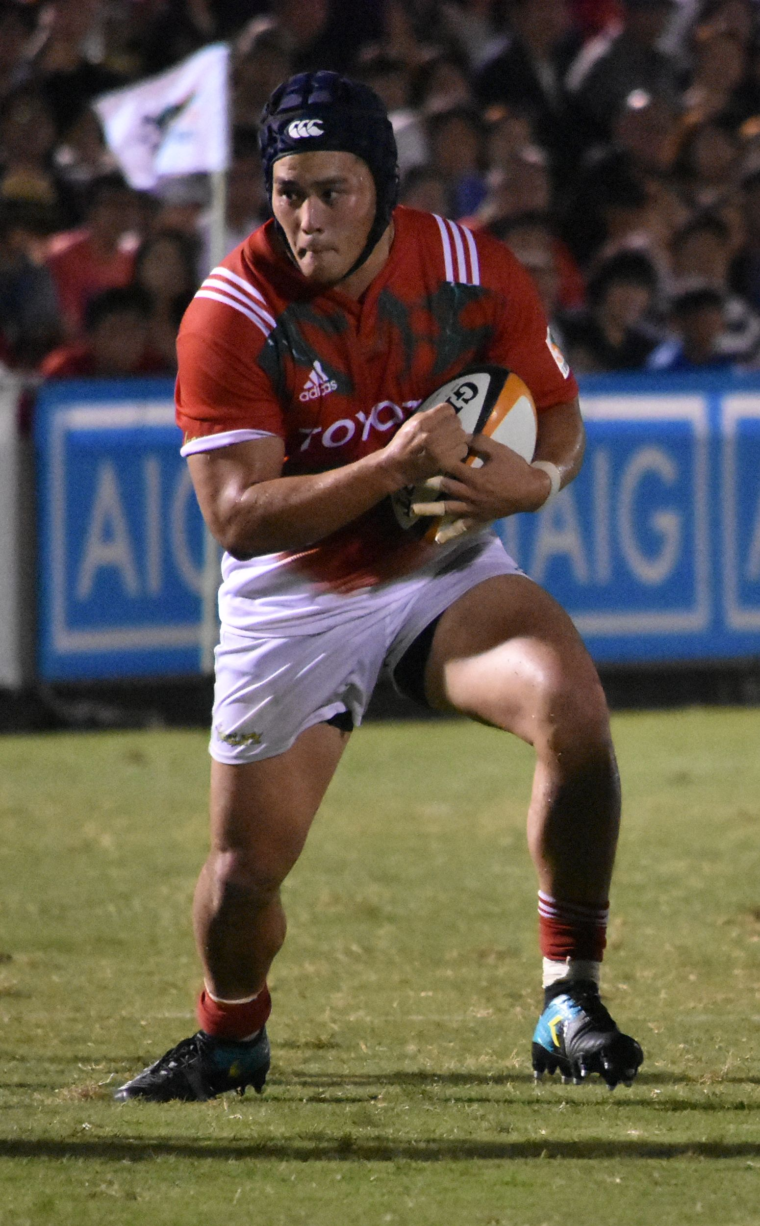 彦坂 匡克